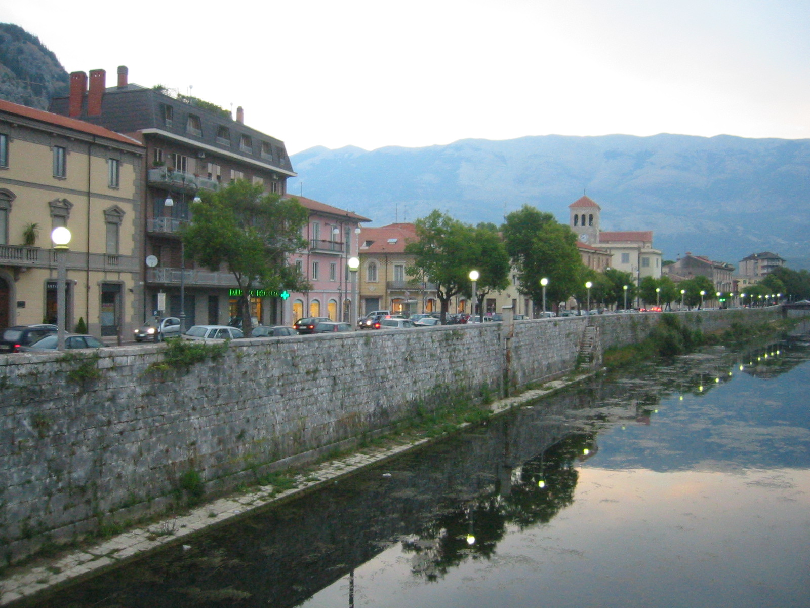 Le , à Sora.